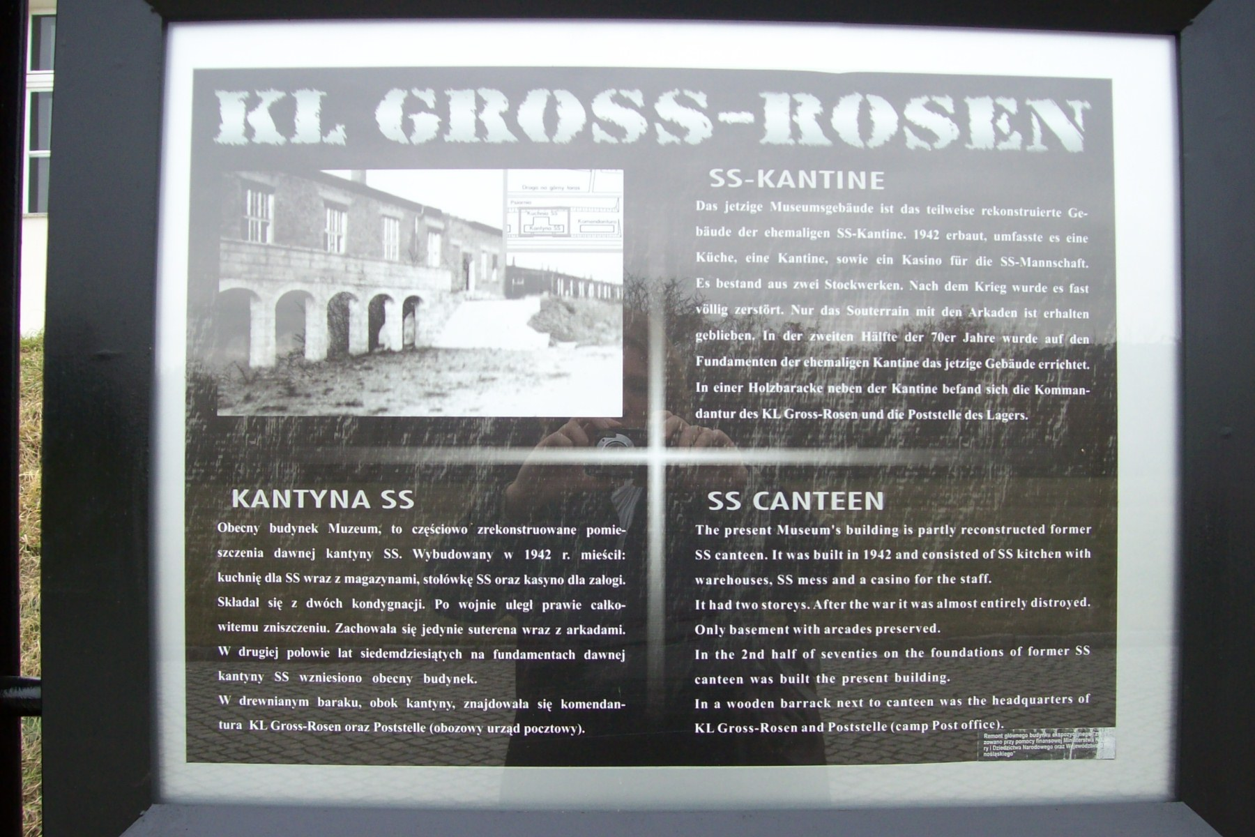 Tablica informacyjna Gross-Rosen